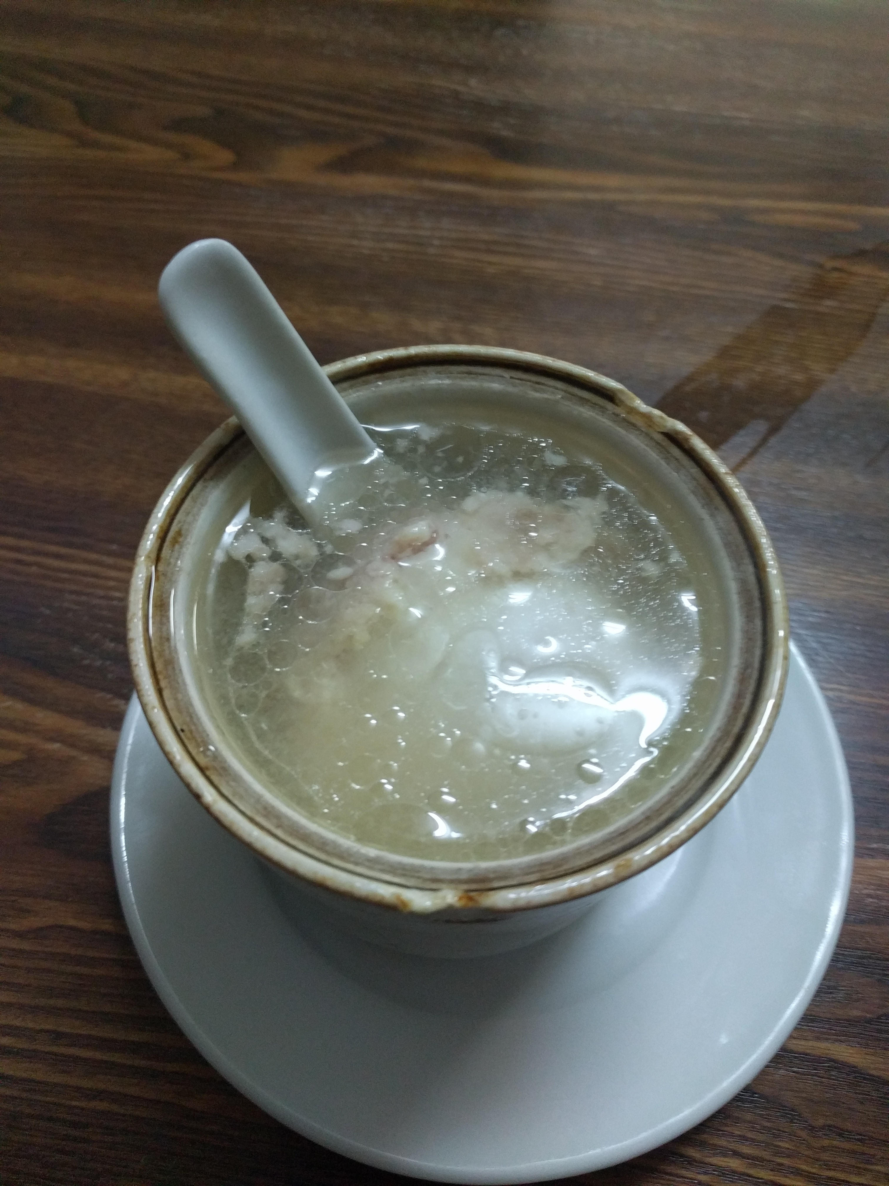 鸡蛋肉饼汤